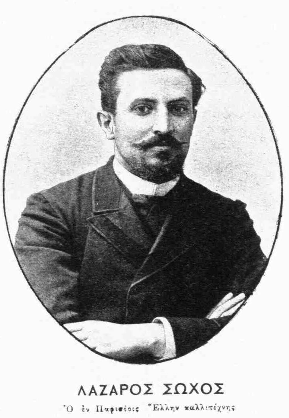 griechischer Bildhauer, 19. Jahrhundert